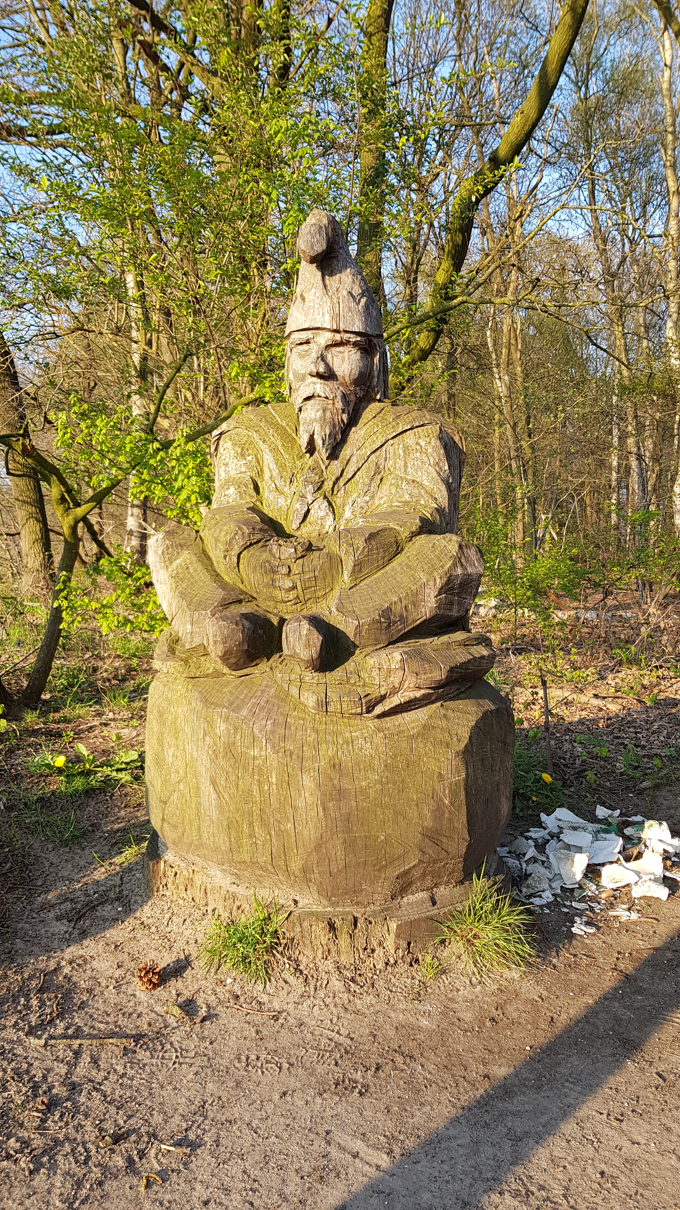 Kaboutersberg, Hoogeloon, Nederland